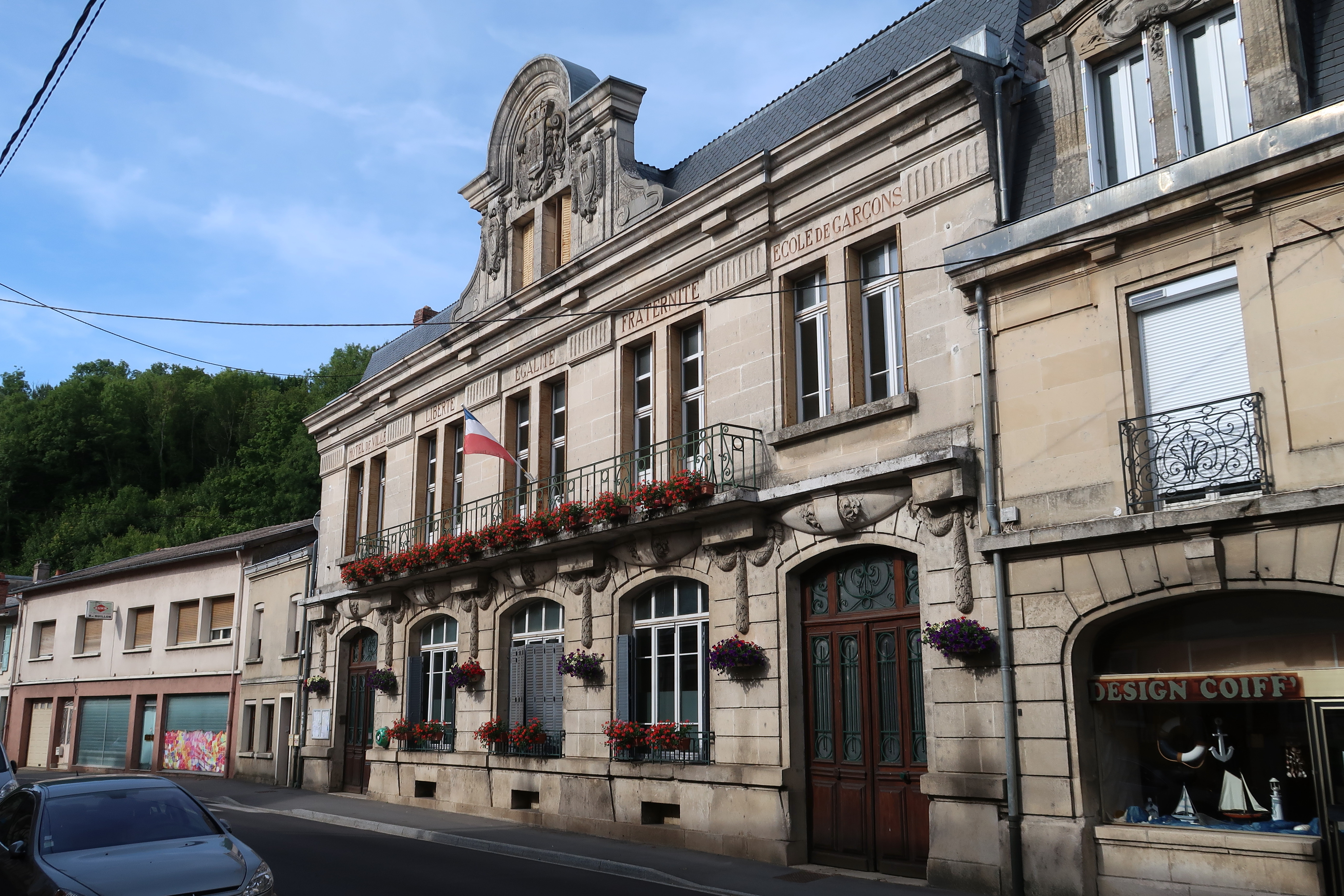 Dun sur Meuse, mairie